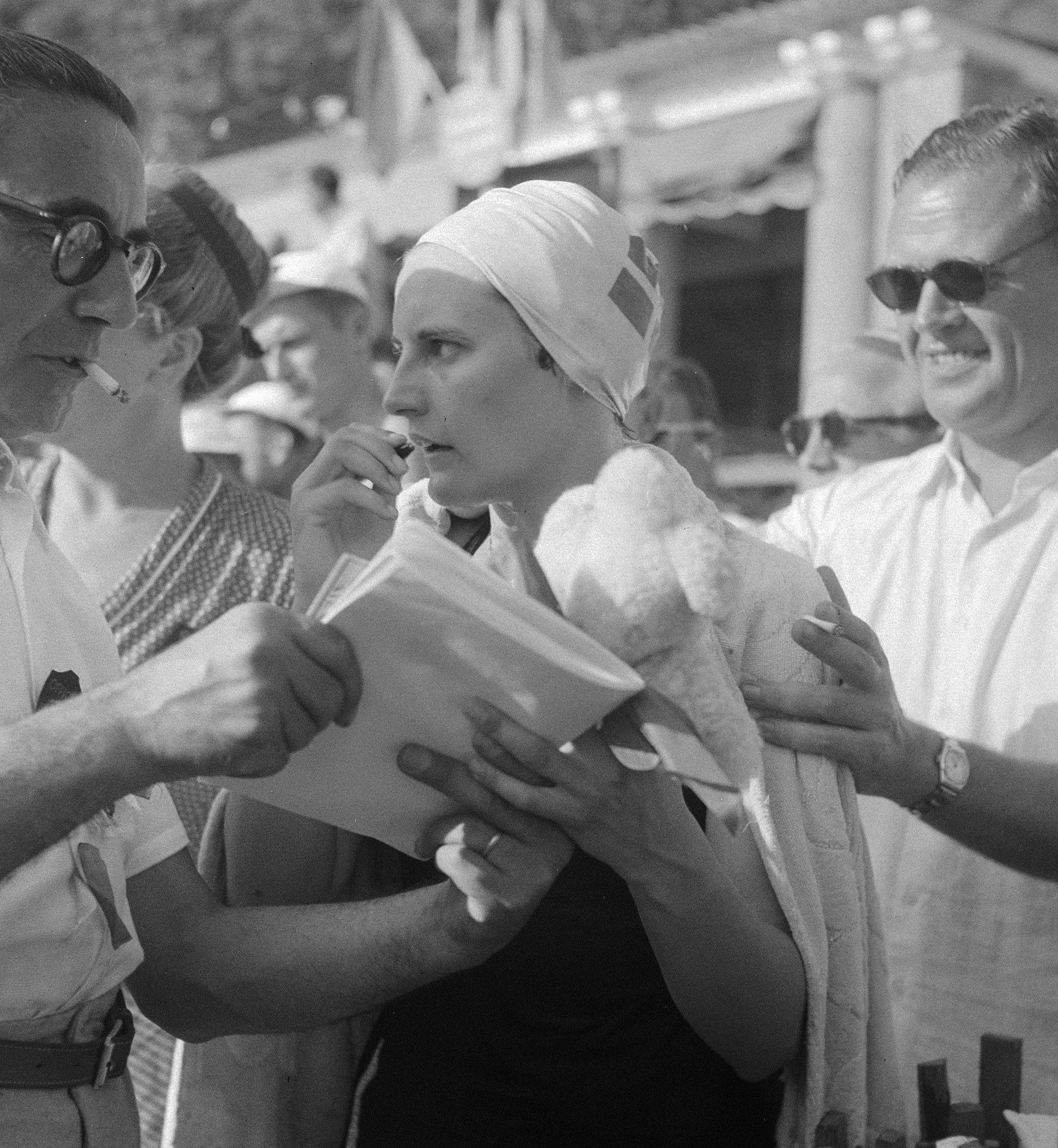 Europese zwemkampioenschappen te Monaco: Fritze Nathansen (Denemarken) kampioen 100 meter vrije slag